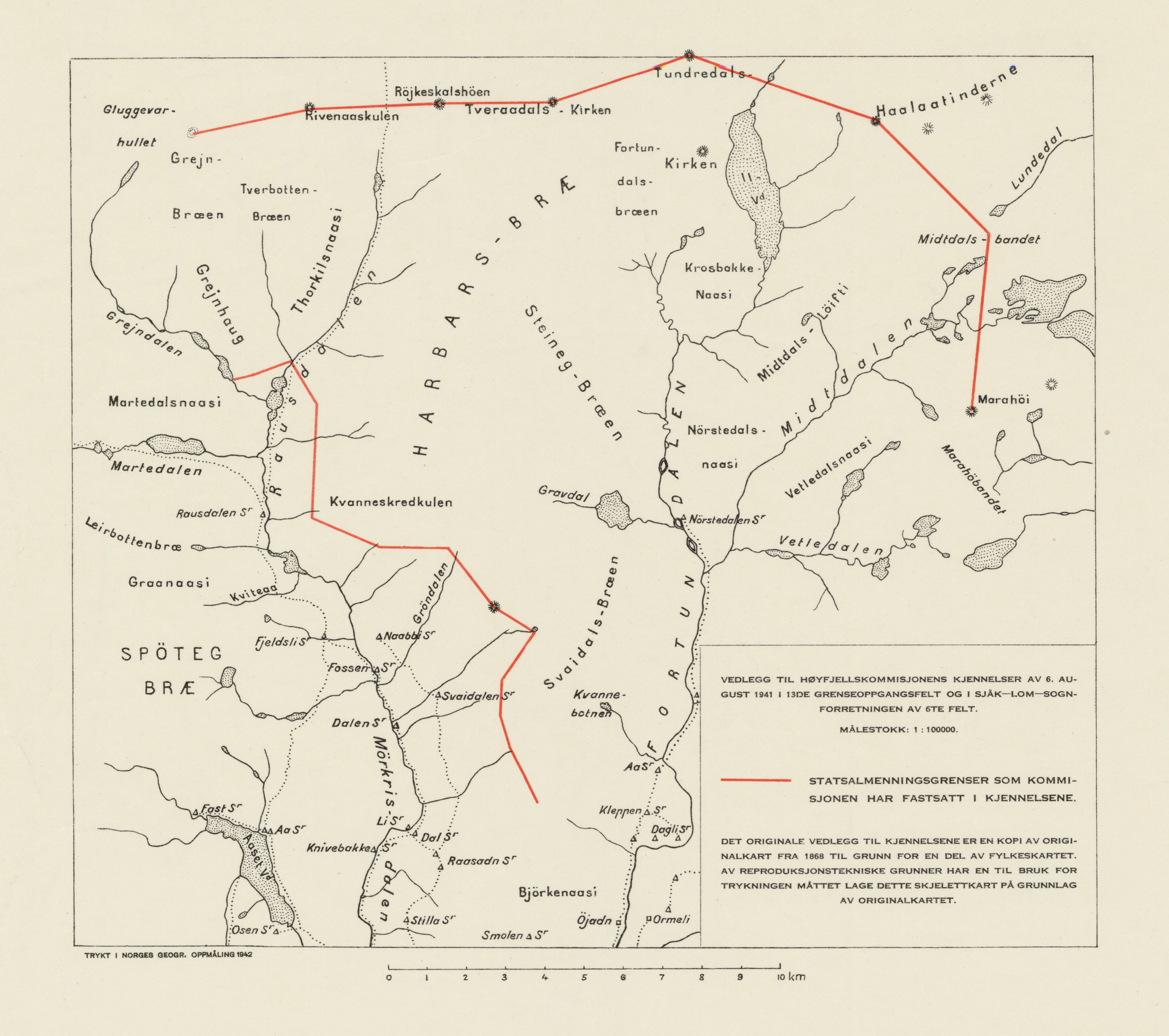 Sjåk-Lom-Sogn; forretningen av 6te felt